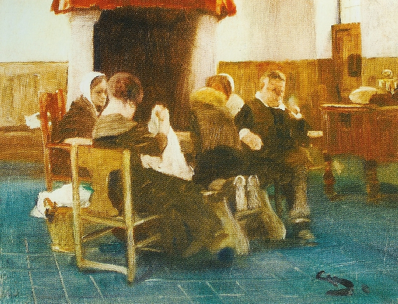 Wilhelm Schreuer: Nachmittag mit der Familie